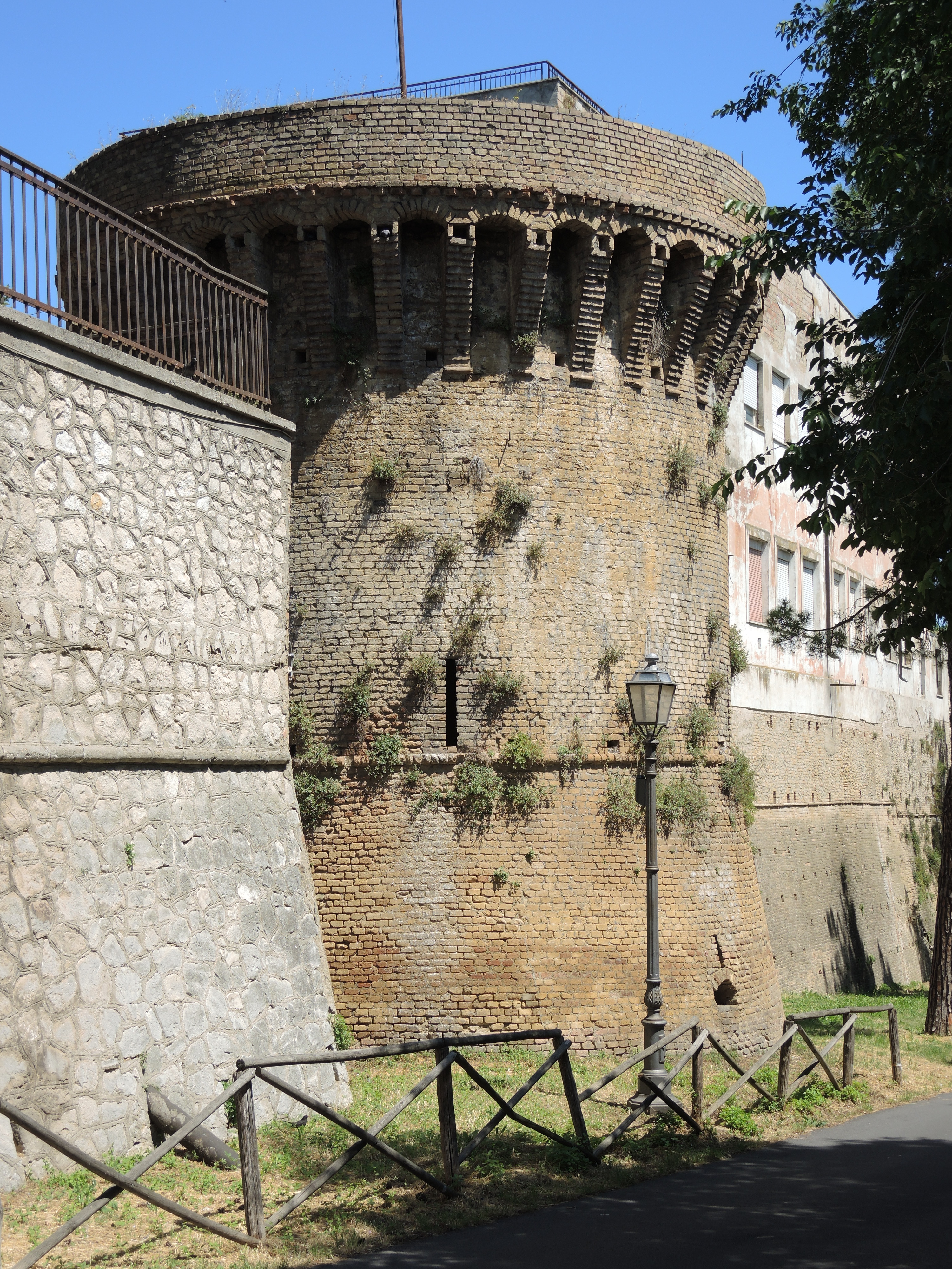 Lanciano - Torrione aragonese